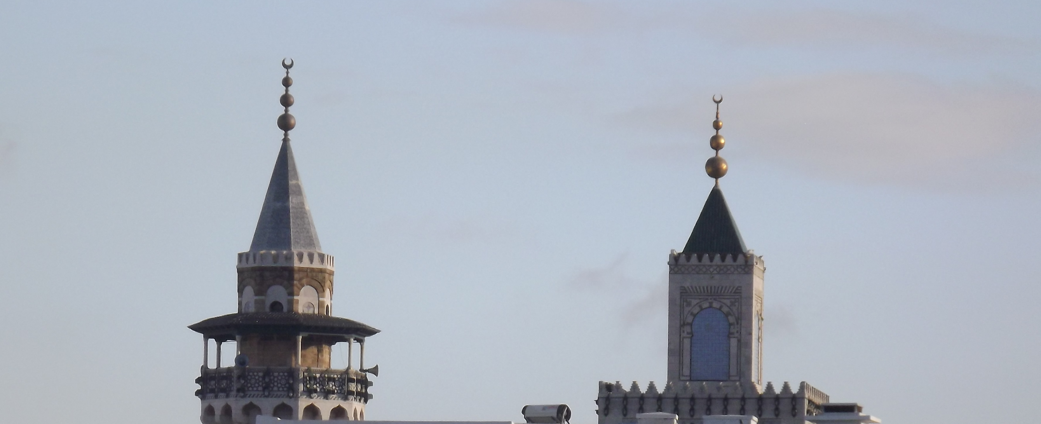 Minarets de la mosquée el Zitouna (droite) et de la mosquée Hamouda Pasha (gauche)